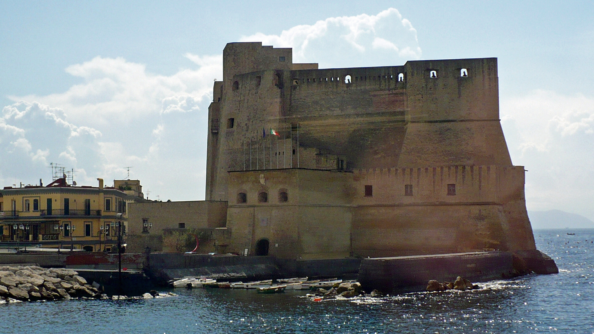 Castell Dell'Ovo, Napoli